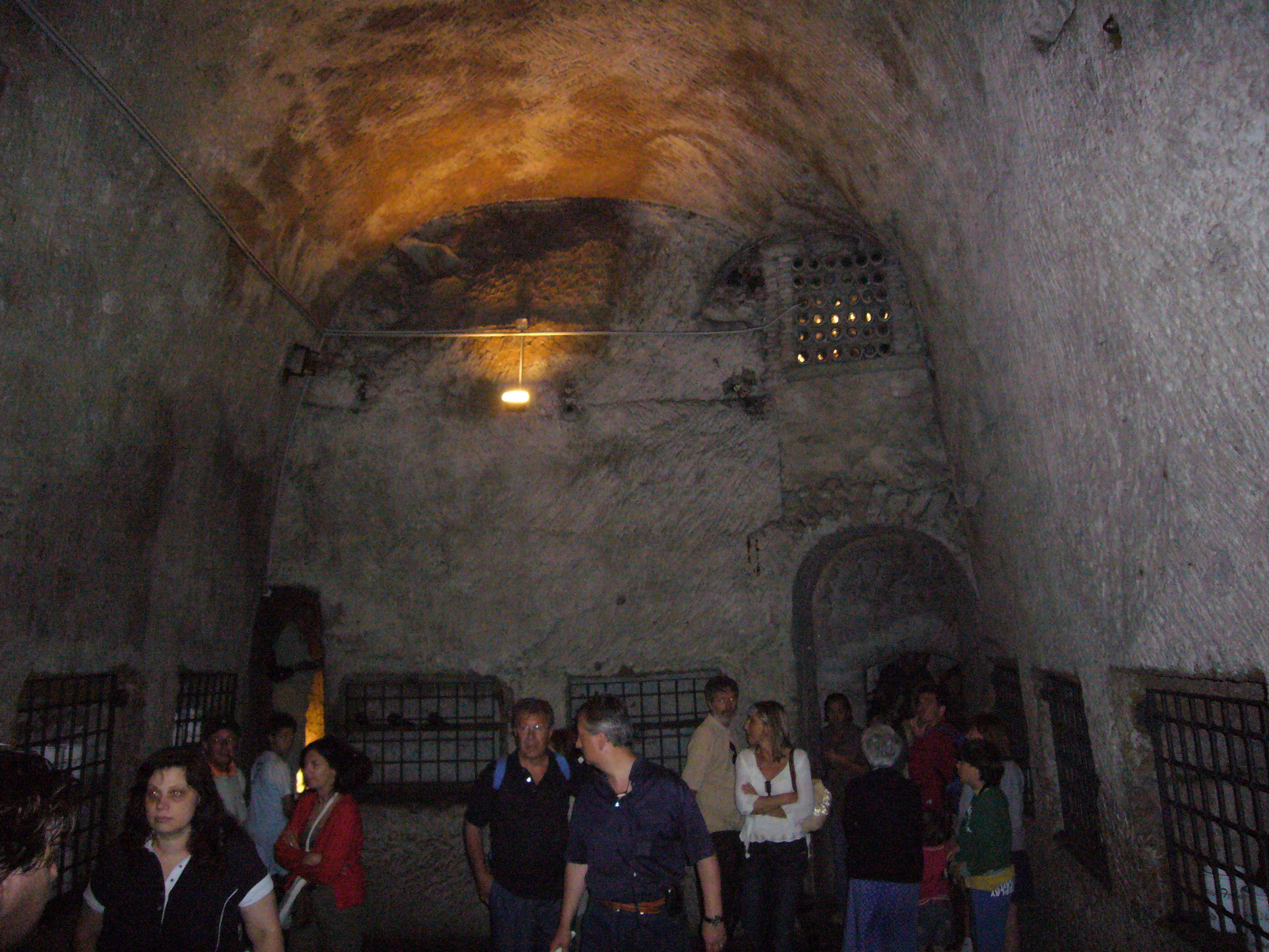 Napoli sotterranea (da piazza San Gaetano): cantina